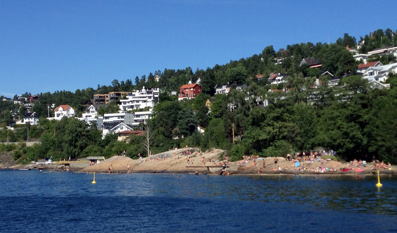 Katten badeplass i Oslo sett fra sjøsiden